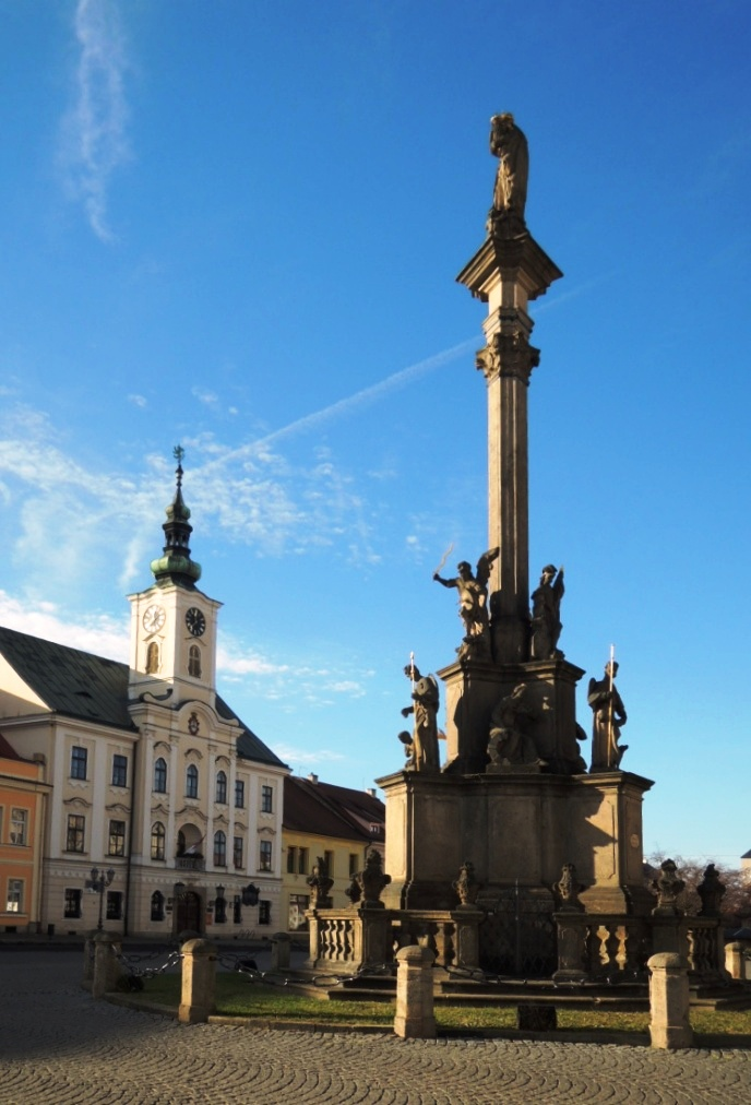 Morovy sloup a radnice, Masarykovo náměstí, Rokycany